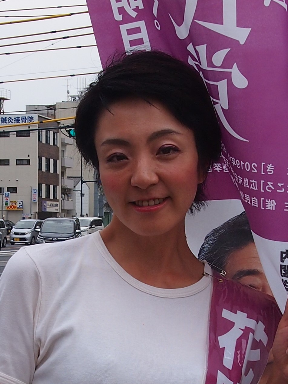 河井案里（河井あんり）、撮影当時参議院選挙出馬予定者。撮影時にウィキペディアへの掲載について説明済み。